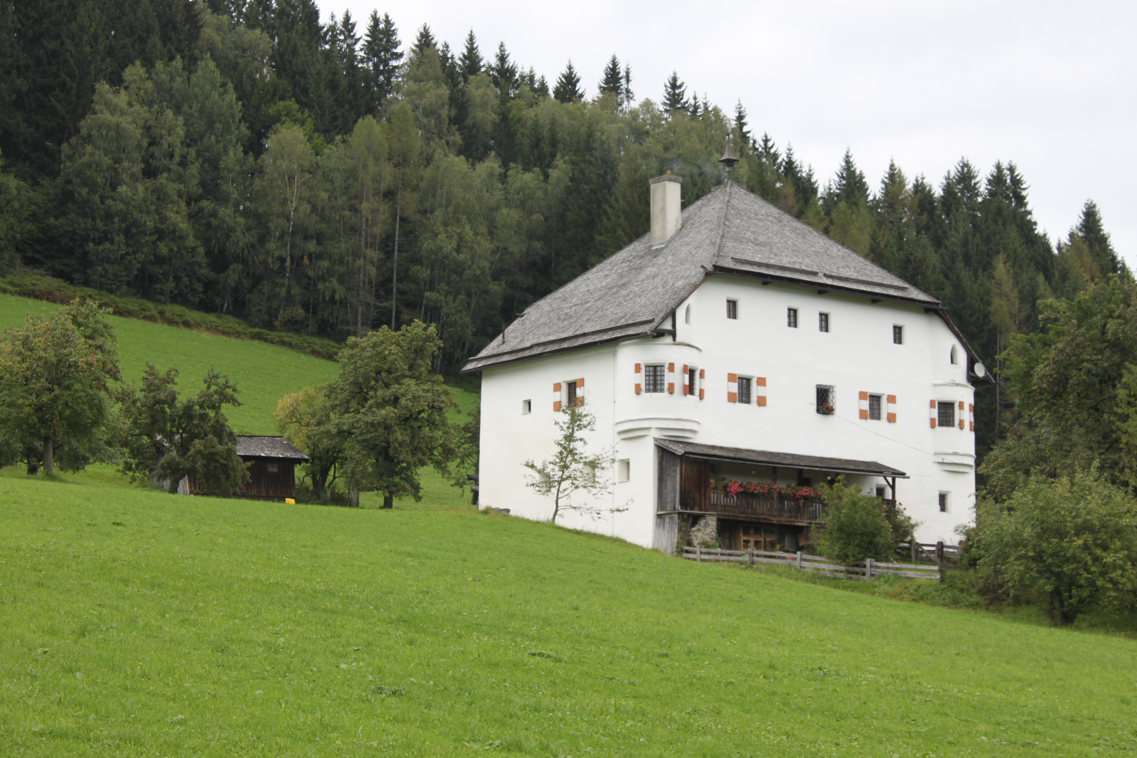 Schlösschen Judenhof (Sonnhof)